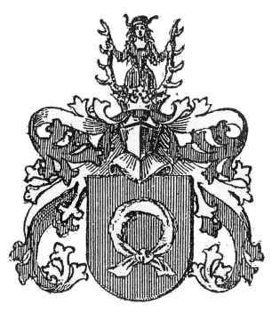 Herb Nałęcz